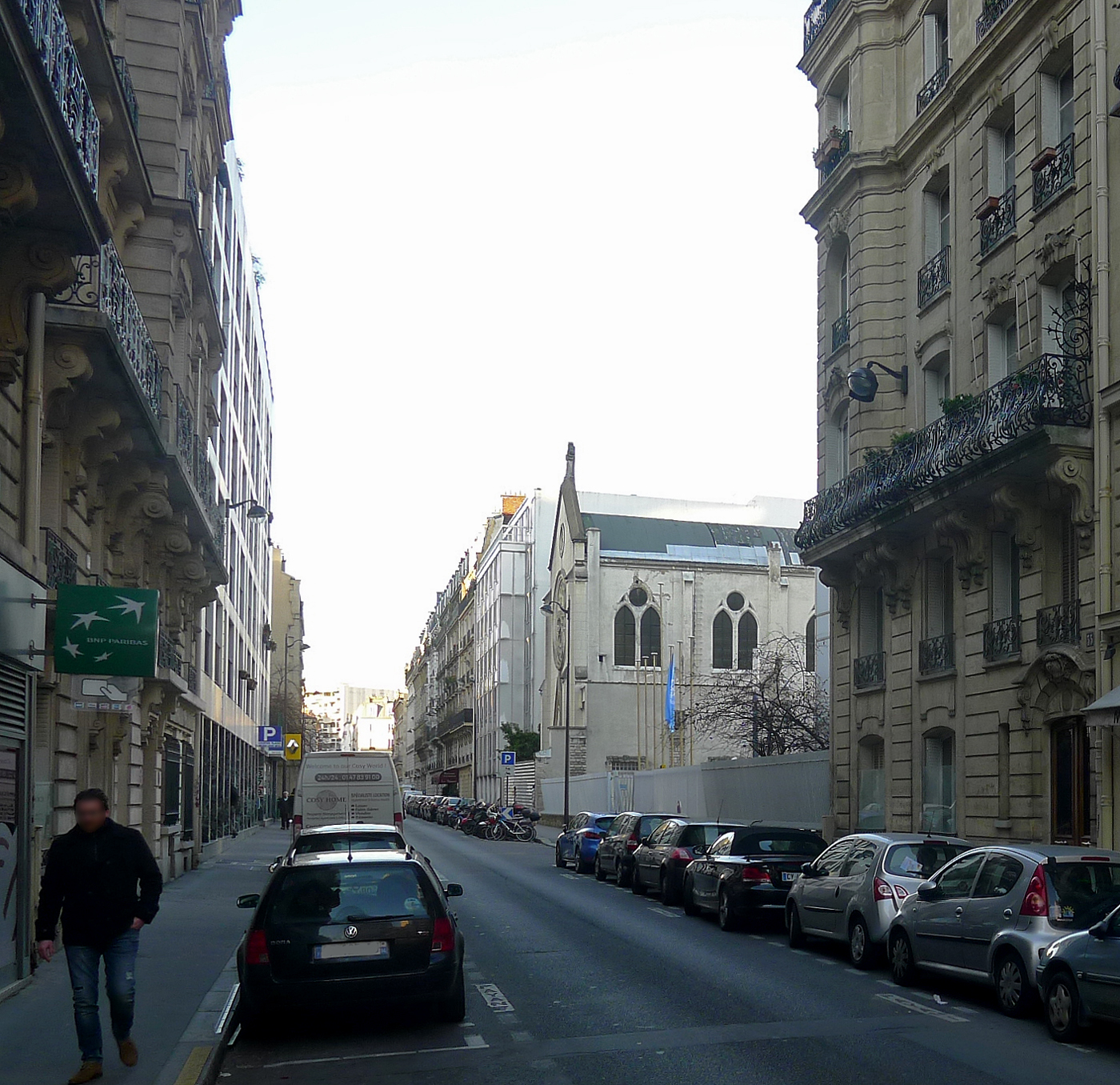 Rue François-Bonvin - Paris 15